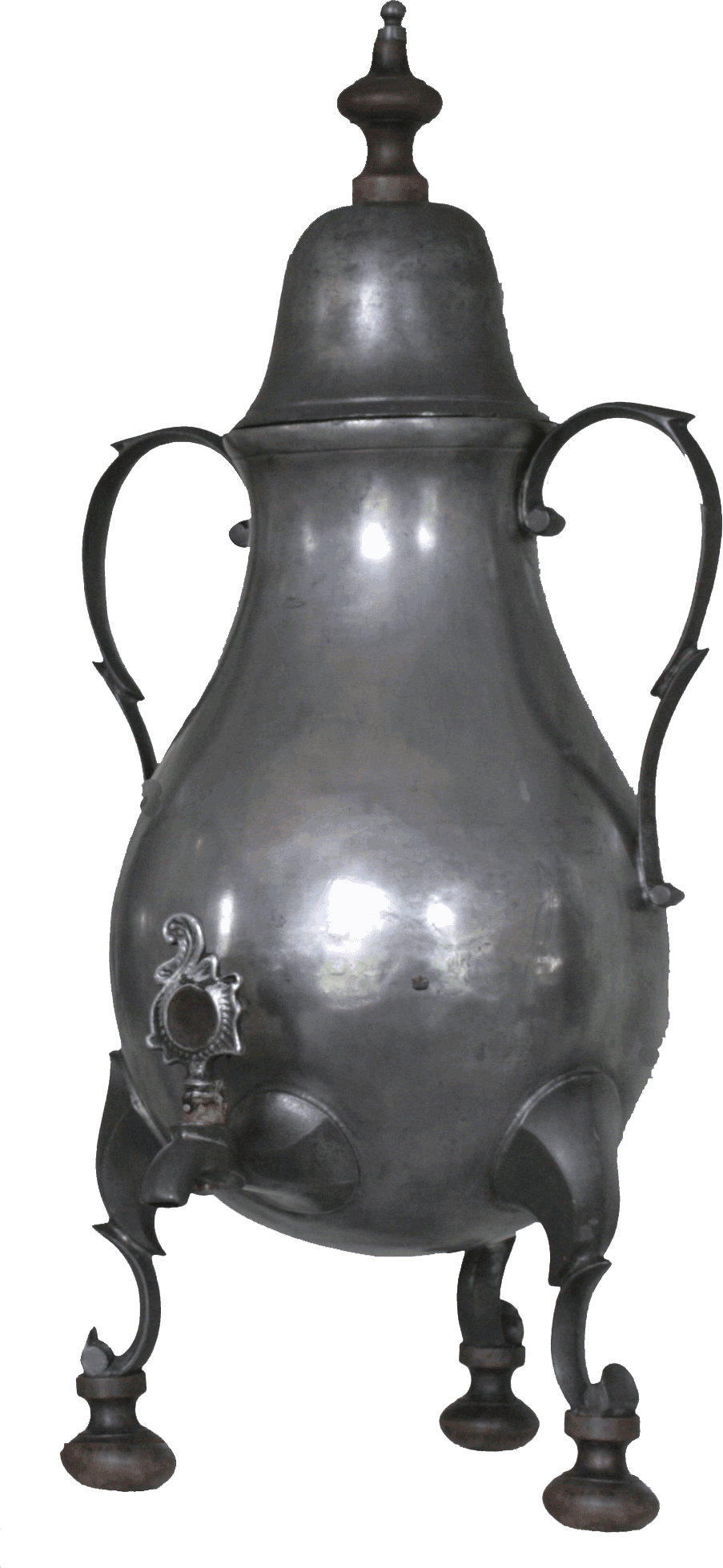 Dröppelminna